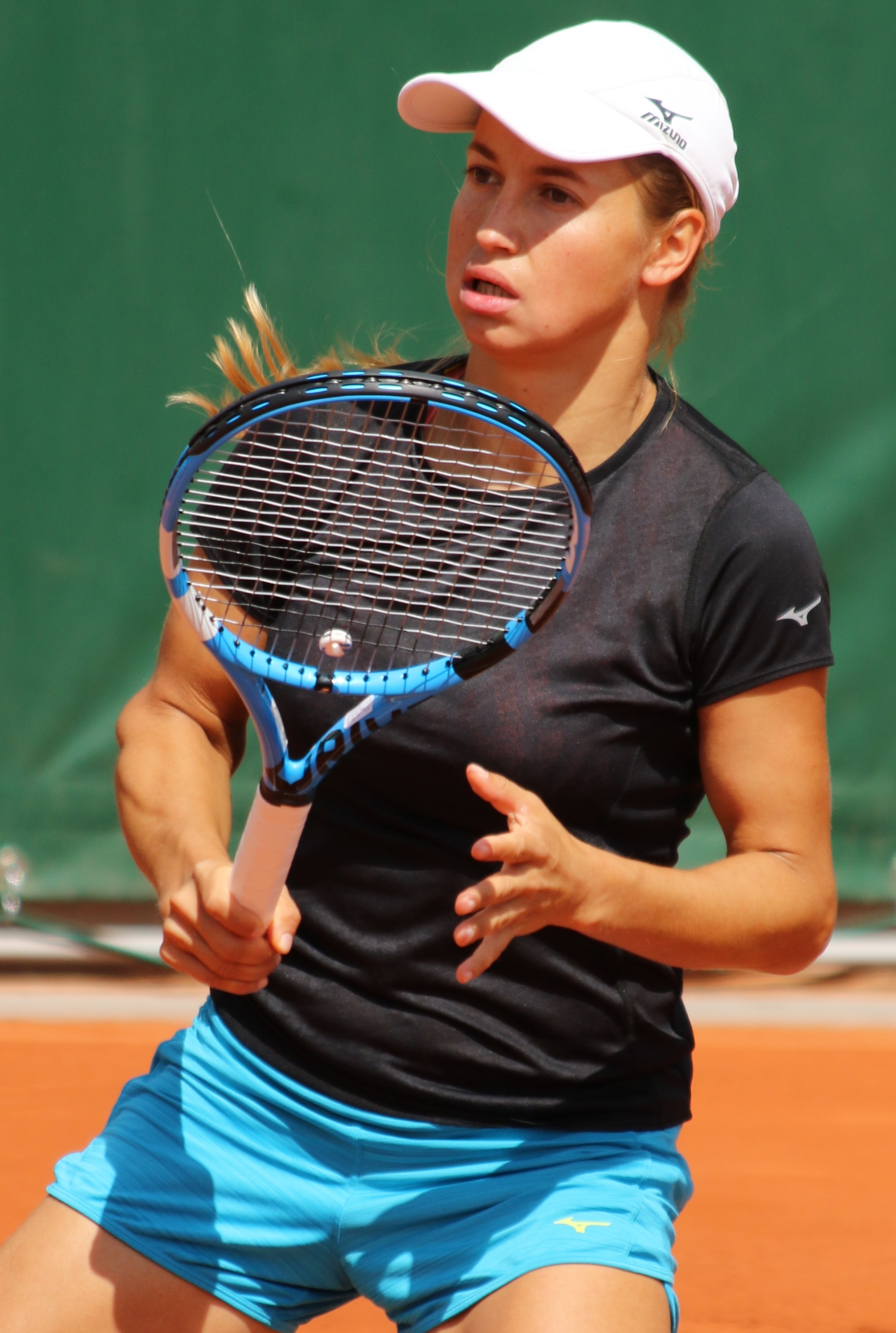 Putintseva RG19 (26)